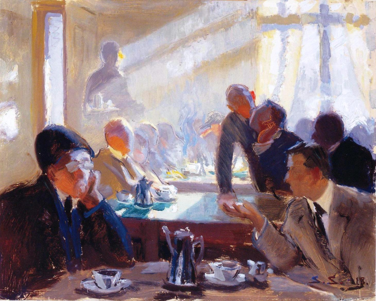 Santeri Salokiven maalaus legendaarisesta helsinkiläisestä Brondinin kahvilasta. Maalaus kuuluu Helsingin taidemuseon omistamaan Bäcksbackan kokoelmaan.